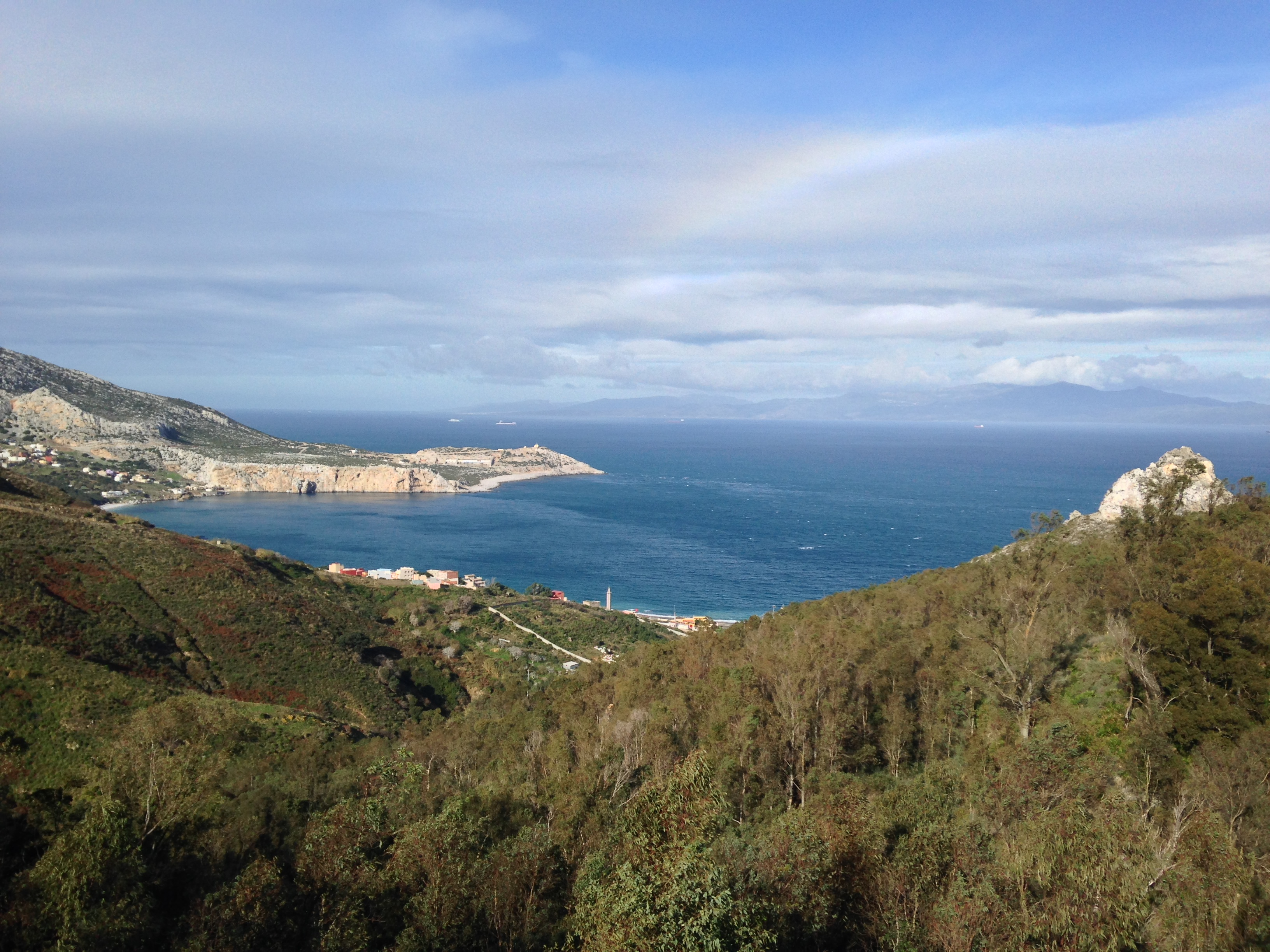 Bahía de Beliones, punta Leona y a lo lejos Tarifa desde Ceuta.